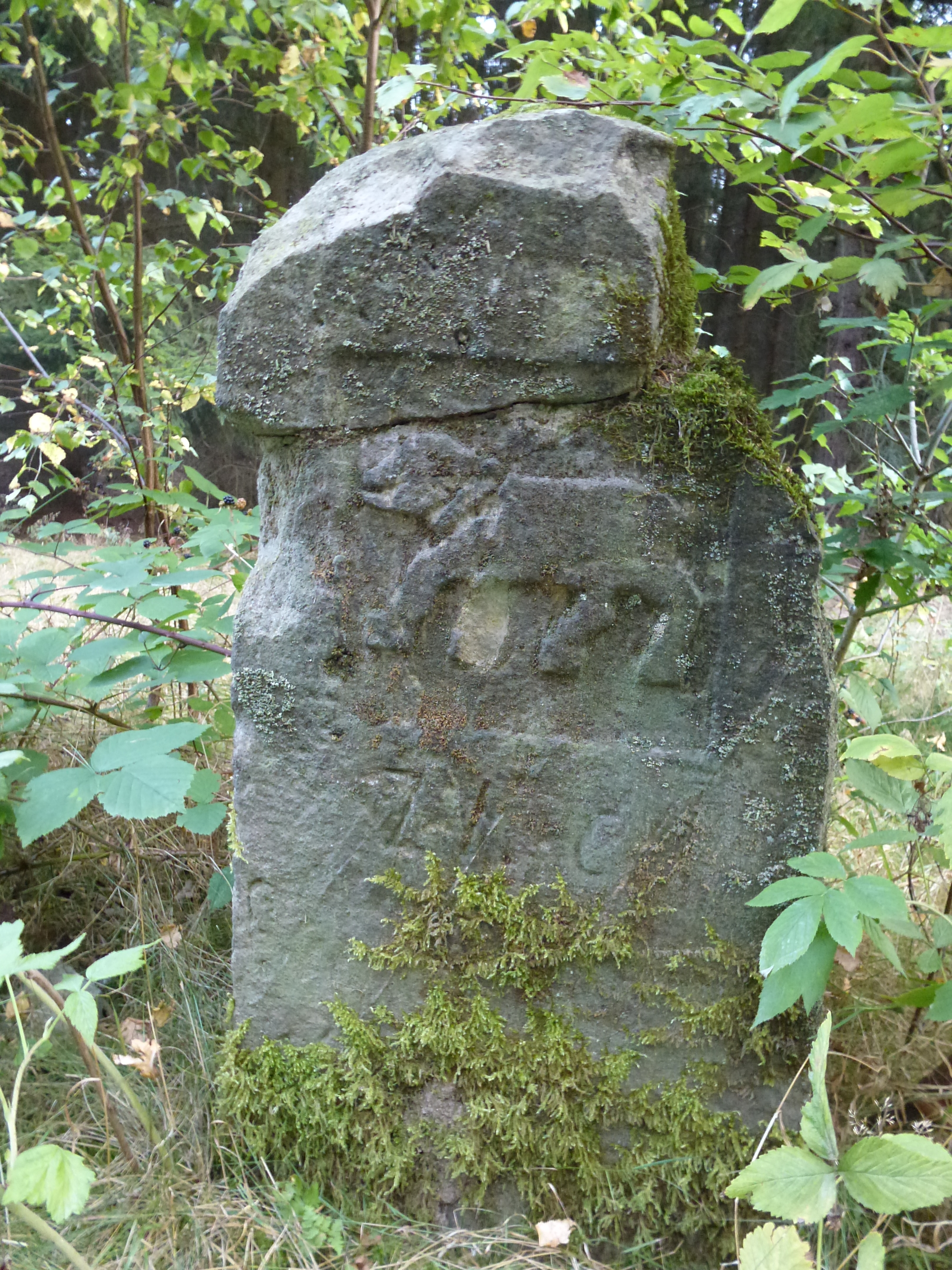 Grenzstein der ehemaligen Grenze zwischen Anhalt-Bernburg und Amt Falkenstein (Preußen) an der Meisdorfer Trift südwestl. der Ortslage oberhalb des Selketales zwischen Rehköpfe und Bauernwiese, hier von vorn.